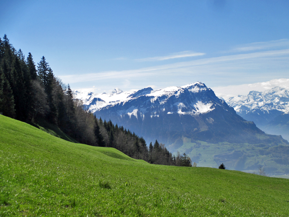 Der Fronalpstock (Kanton Schwyz) vom Engelstock aus gesehen